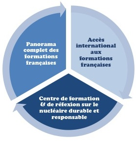 Les missions de l'institut international de l'énergie nucléaire (I2EN)